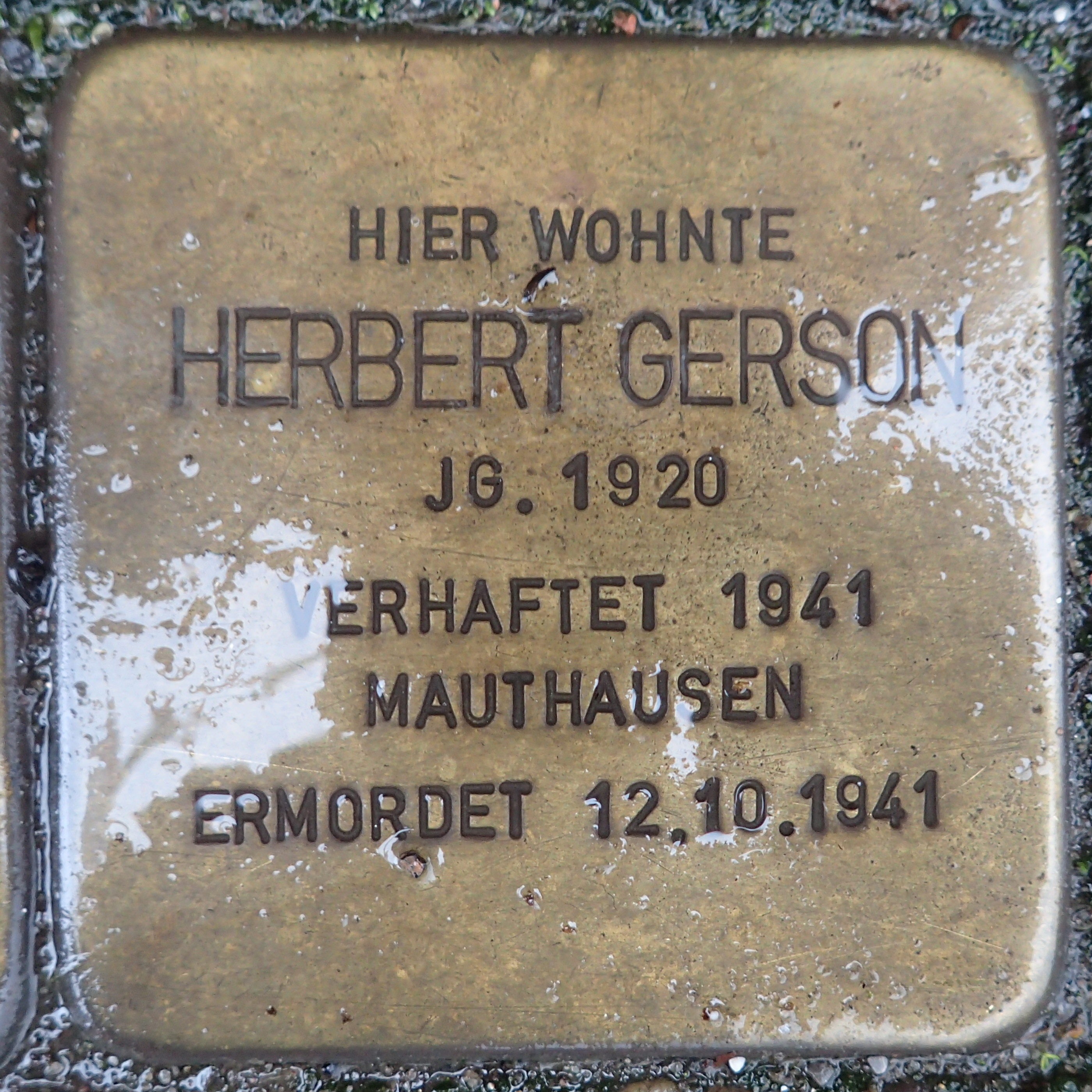 Stolperstein Geldern Bahnhofstraße 36 Herbert Gerson